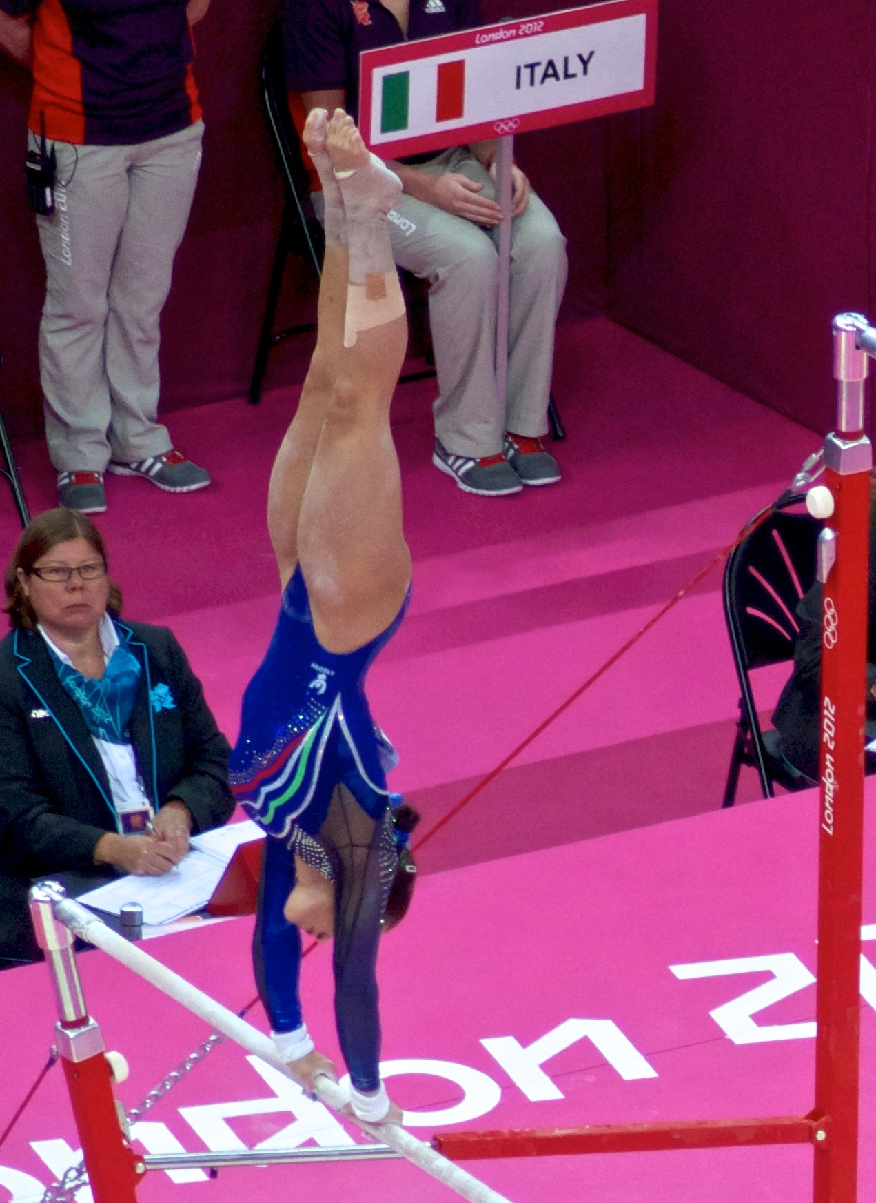 Erika Fasana, Italy